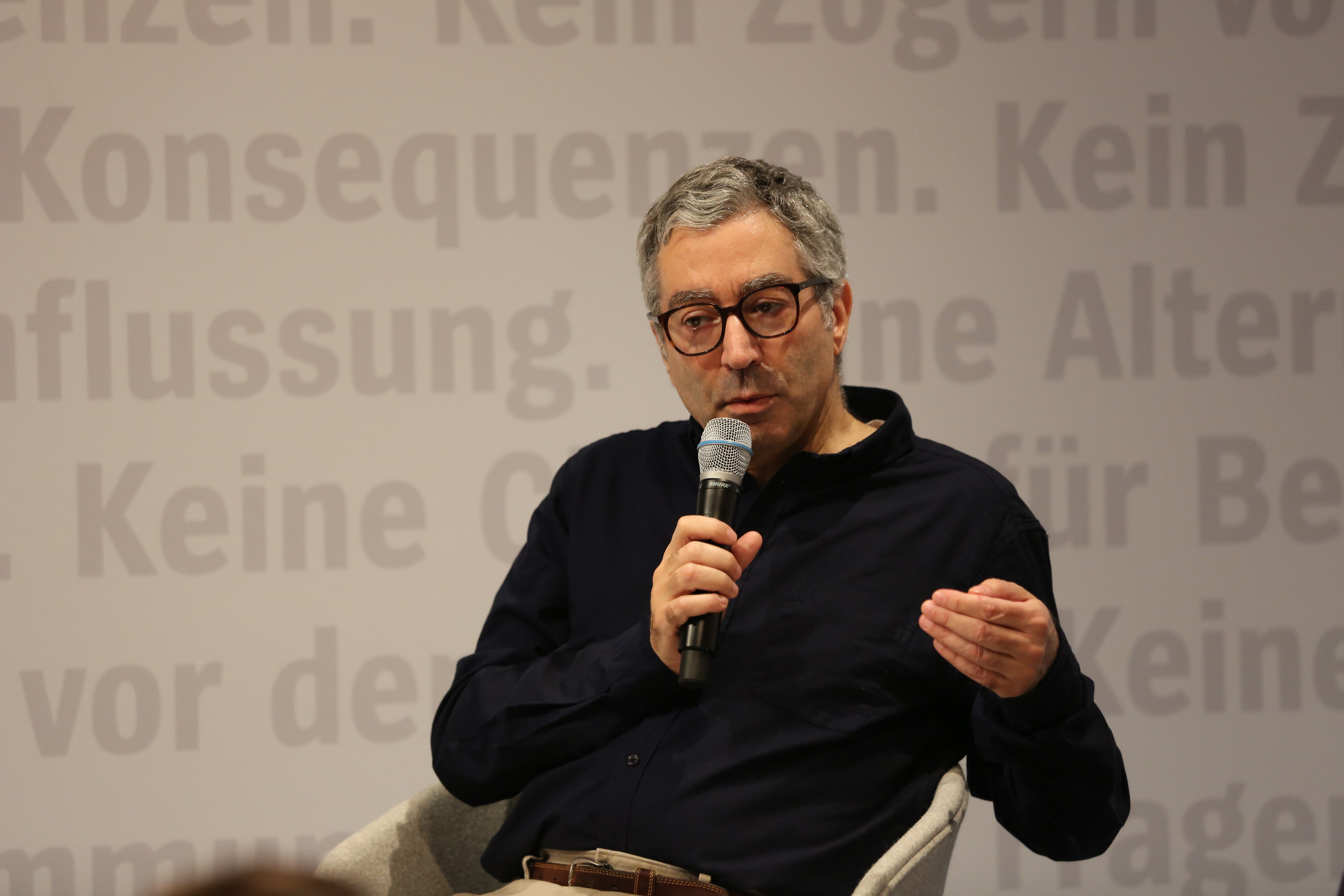 Didier Eribon bei der Frankfurter Buchmesse 2017